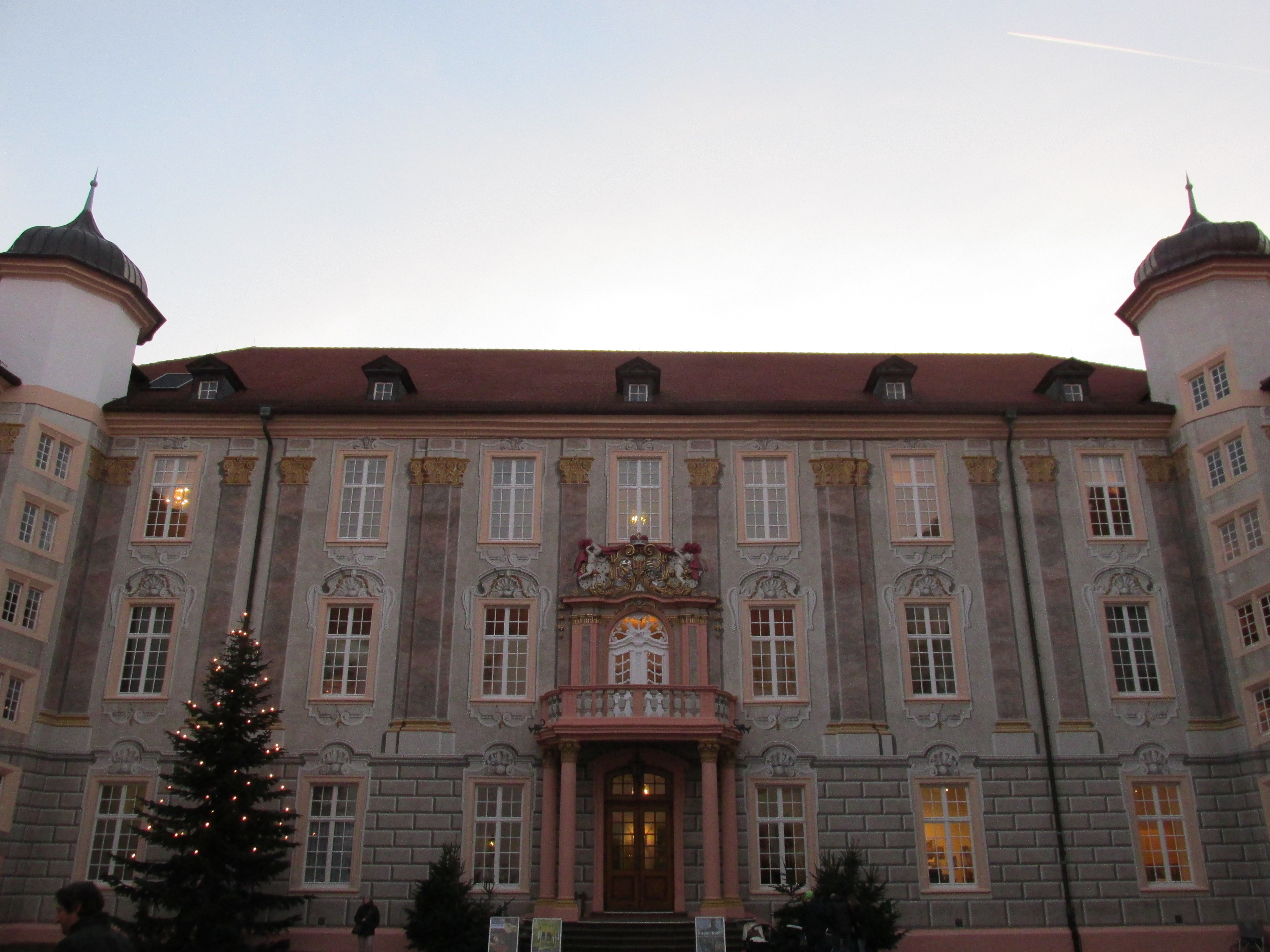 Schloss Ettlingen